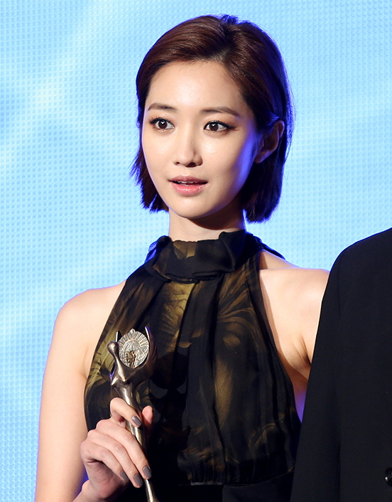 121206 문화연예대상 고준희